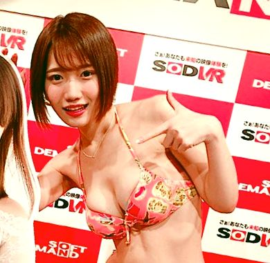 MITSUHA KIKUKAWA 秋葉原